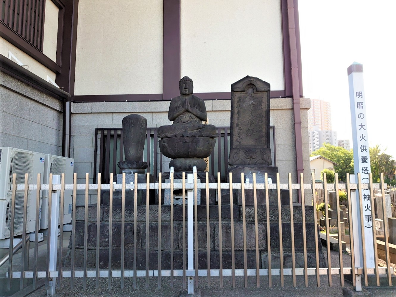 豊島区巣鴨本妙寺境内内にある明暦の大火供養塔